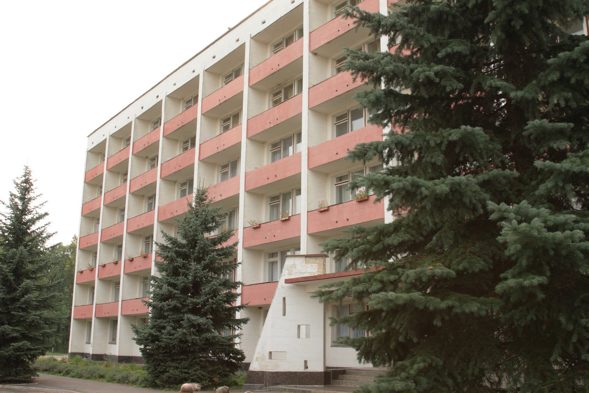 Санаторій Діброва (Біла Церква) фото